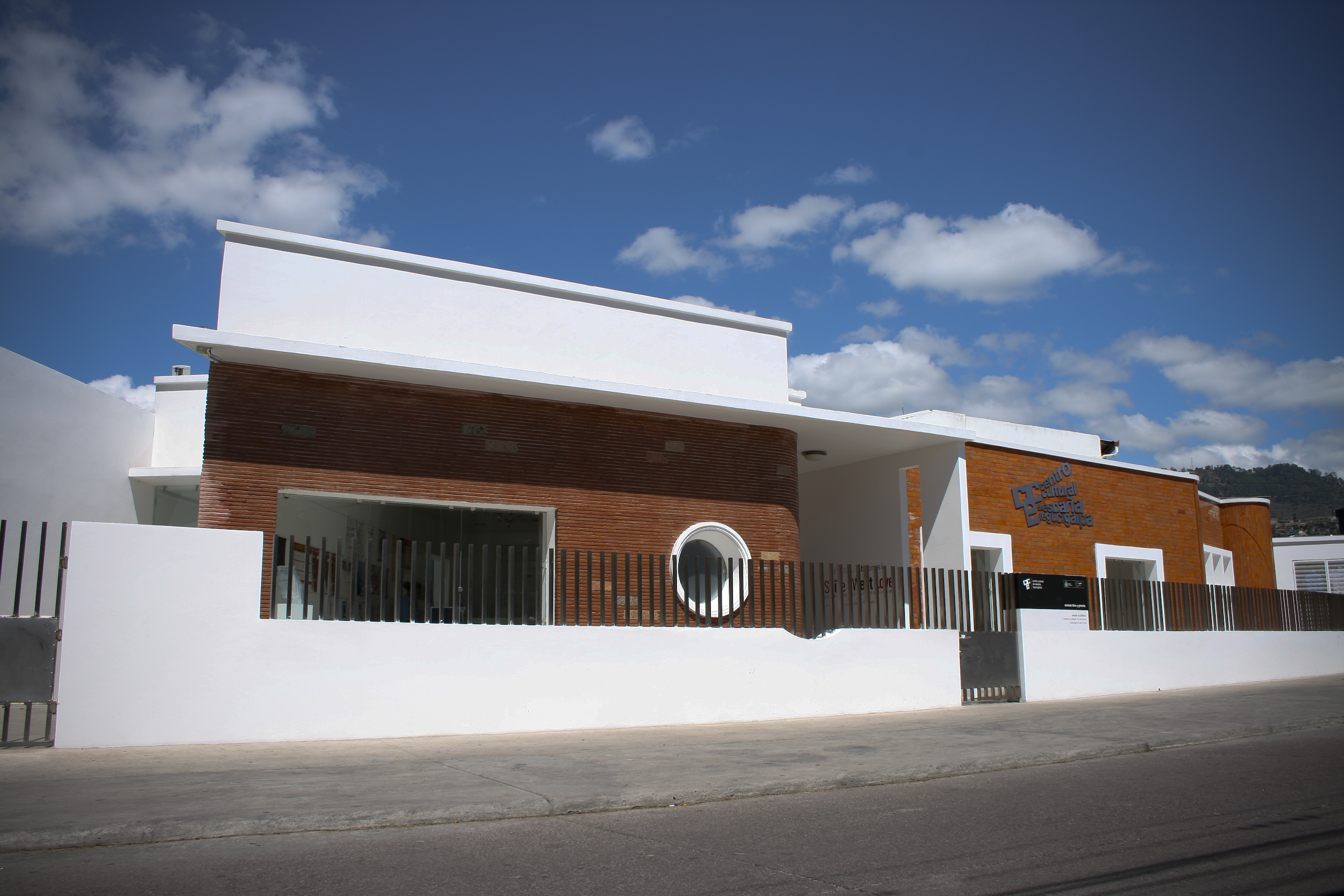 Fachada del CCET